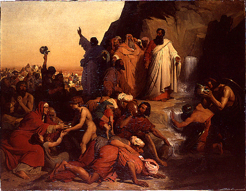 Le frappement du rocher